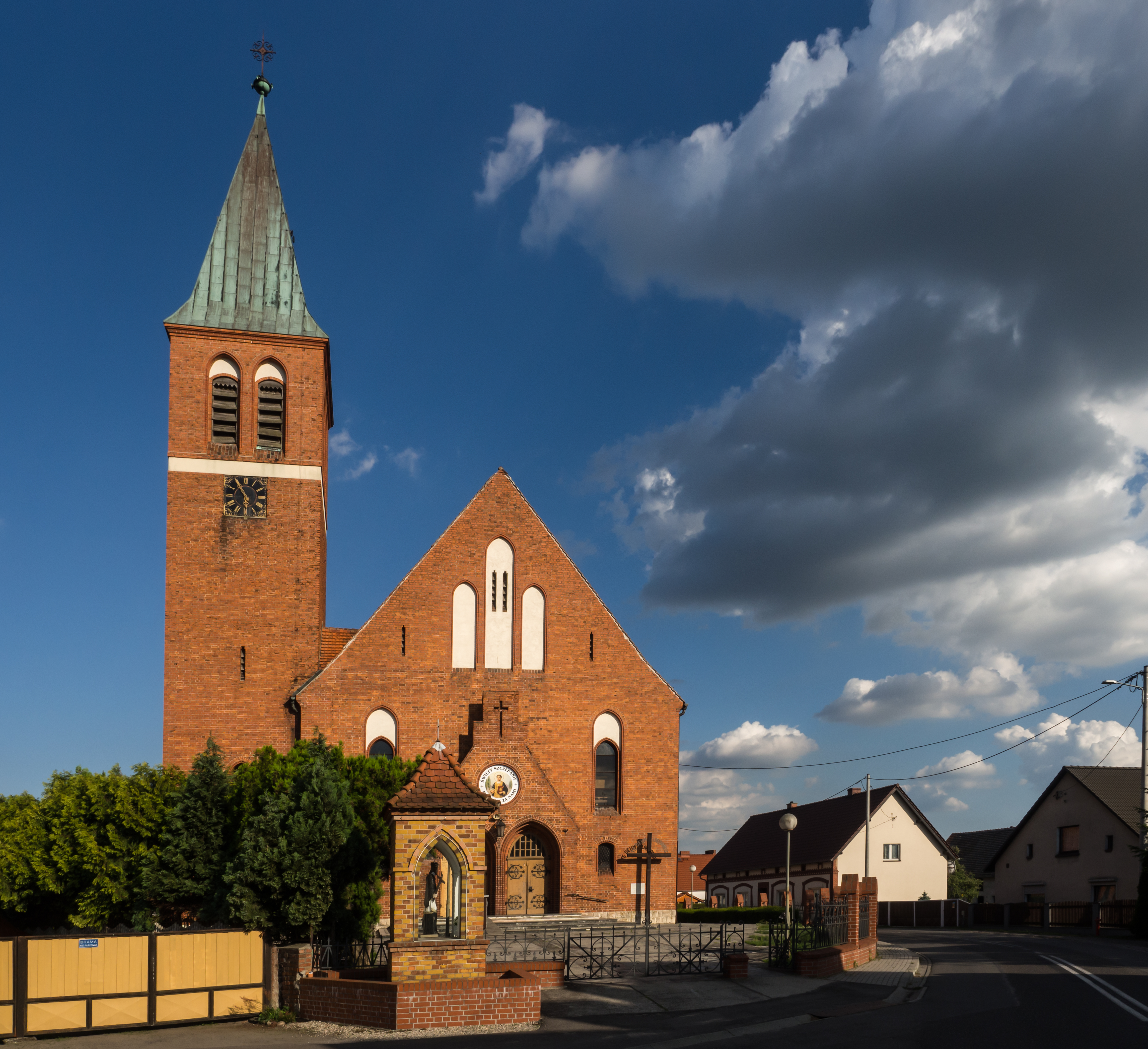 Brynica, kościół par. p.w. św. Szczepana, 1903